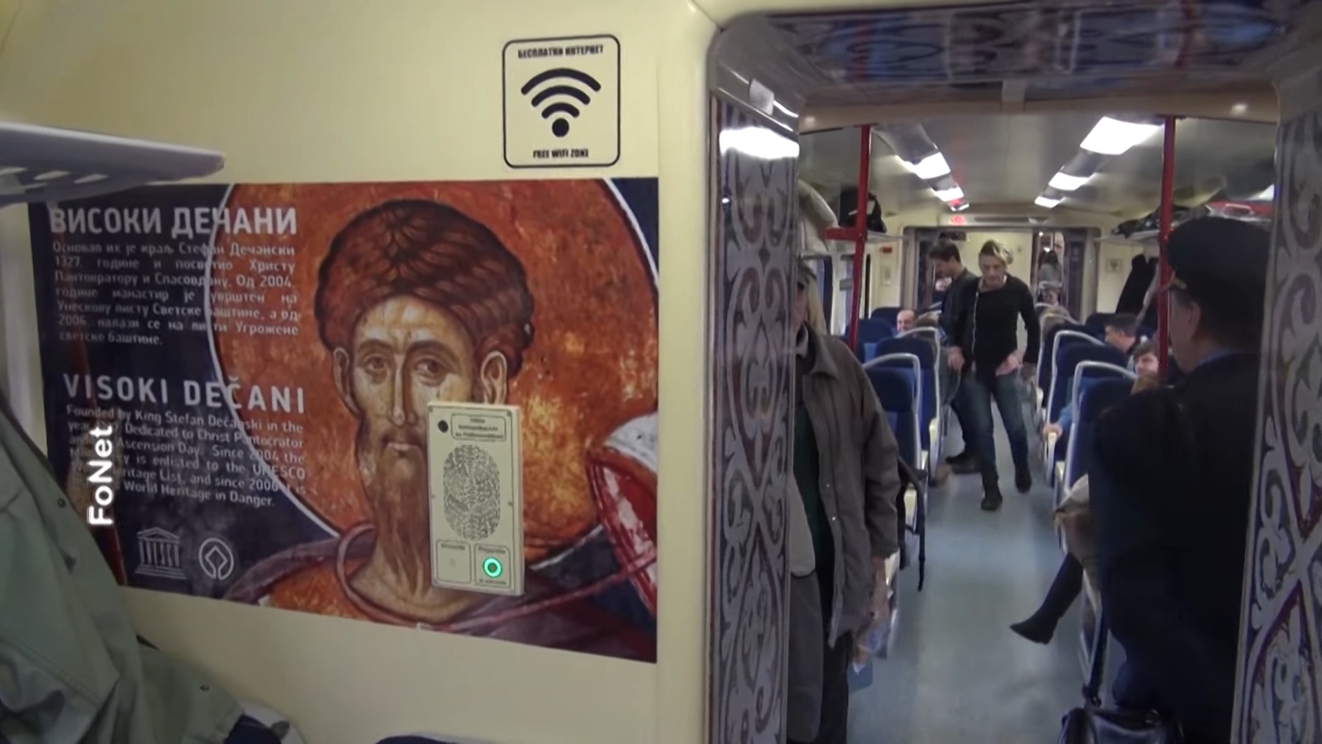 Оформление салона именного поезда ДПС 711-073/074 «Косово - это Сербия»